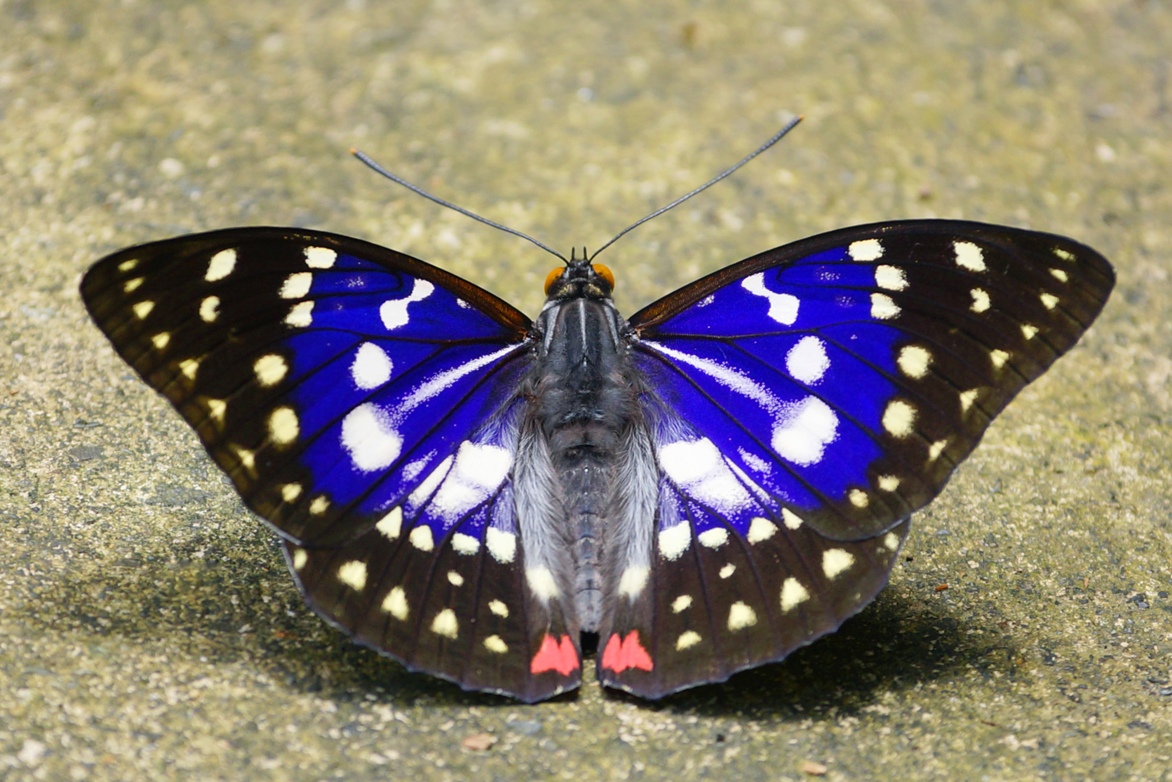 大紫蛺蝶 Sasakia charonda formosana